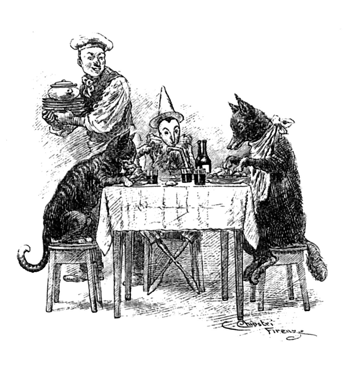 Riproduzione di un'illustrazione di Carlo Chiostri del Pinocchio di Collodi (1901)